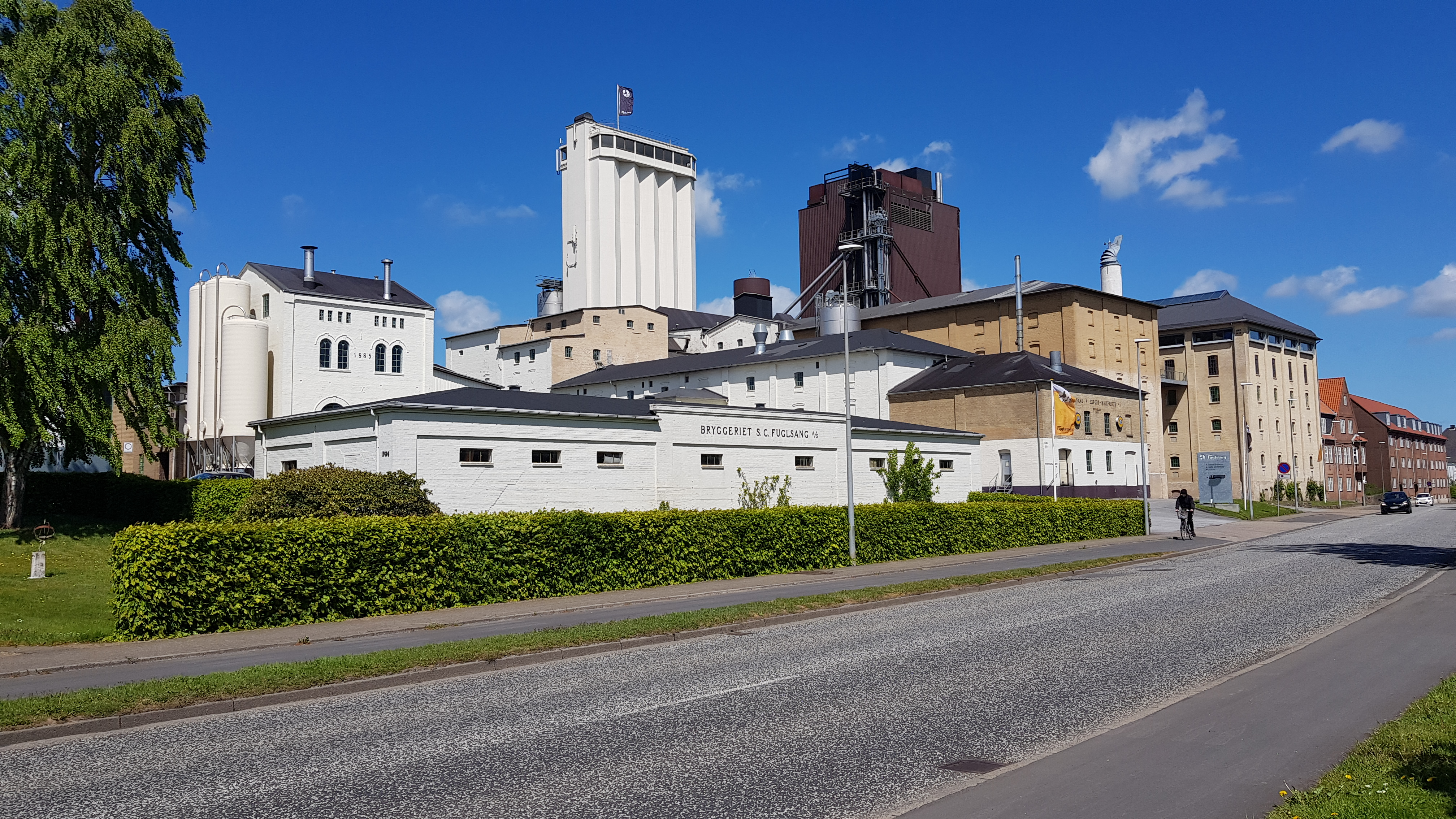 Bryggeriet Fuglsangs bygninger i Haderslev